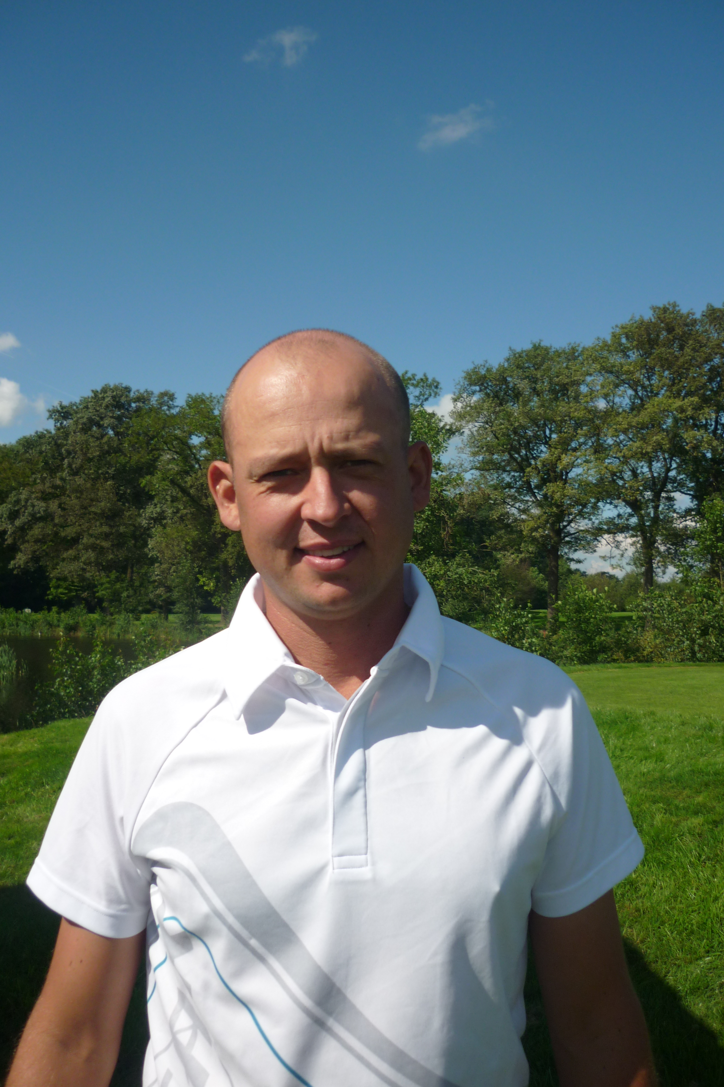 John Bleys, golfer